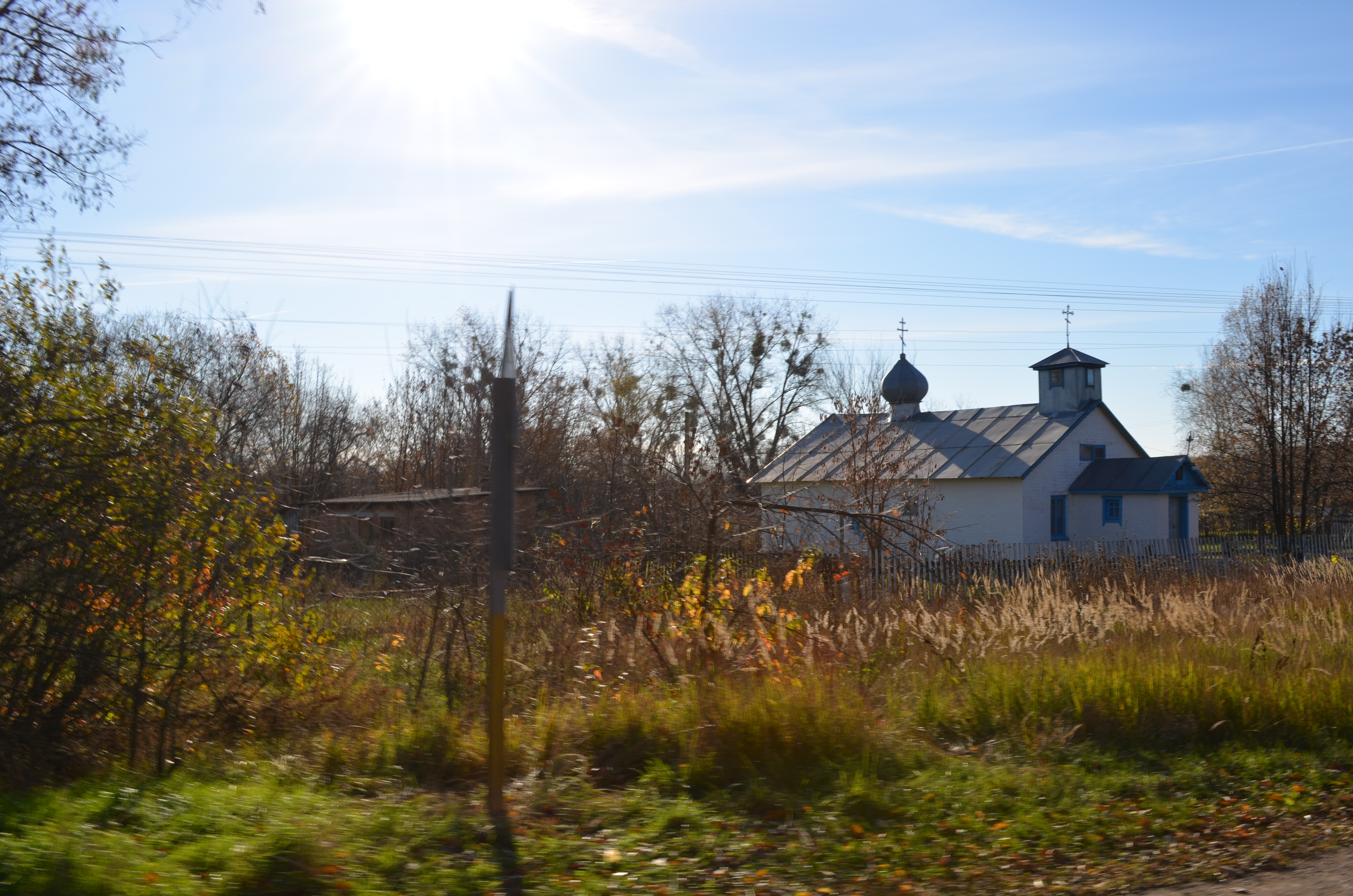 с. Велень